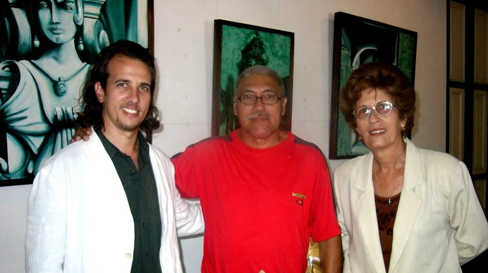 Otto Alvarez junto a Mary Juana Ferro y Pedro Pablo Oliva